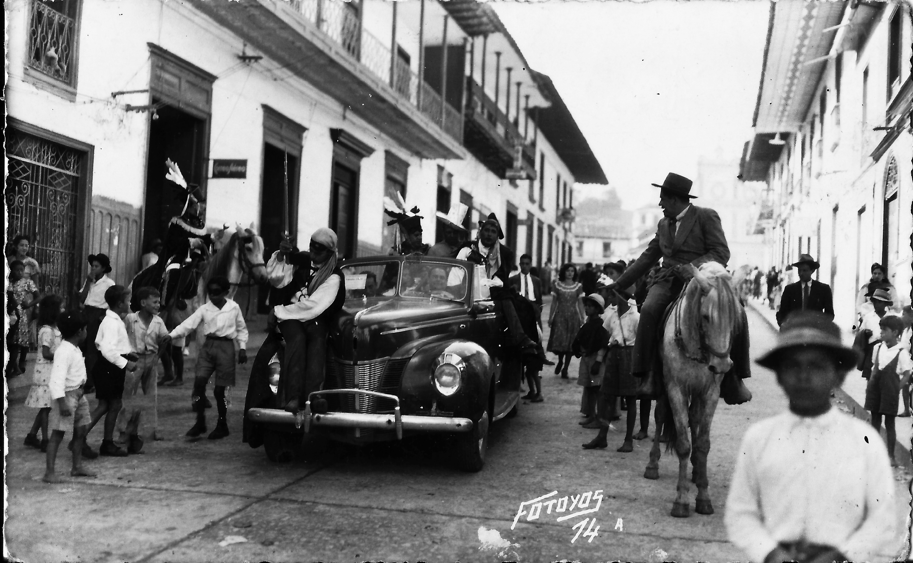 Carnaval 1949.